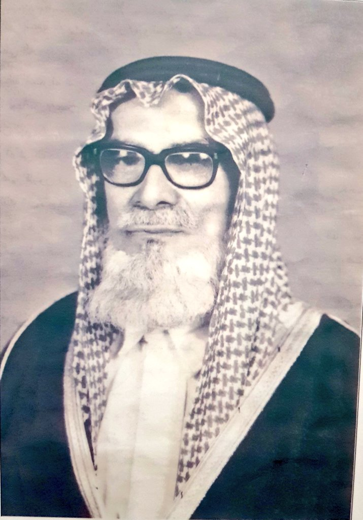 ناصر بن دغيثر